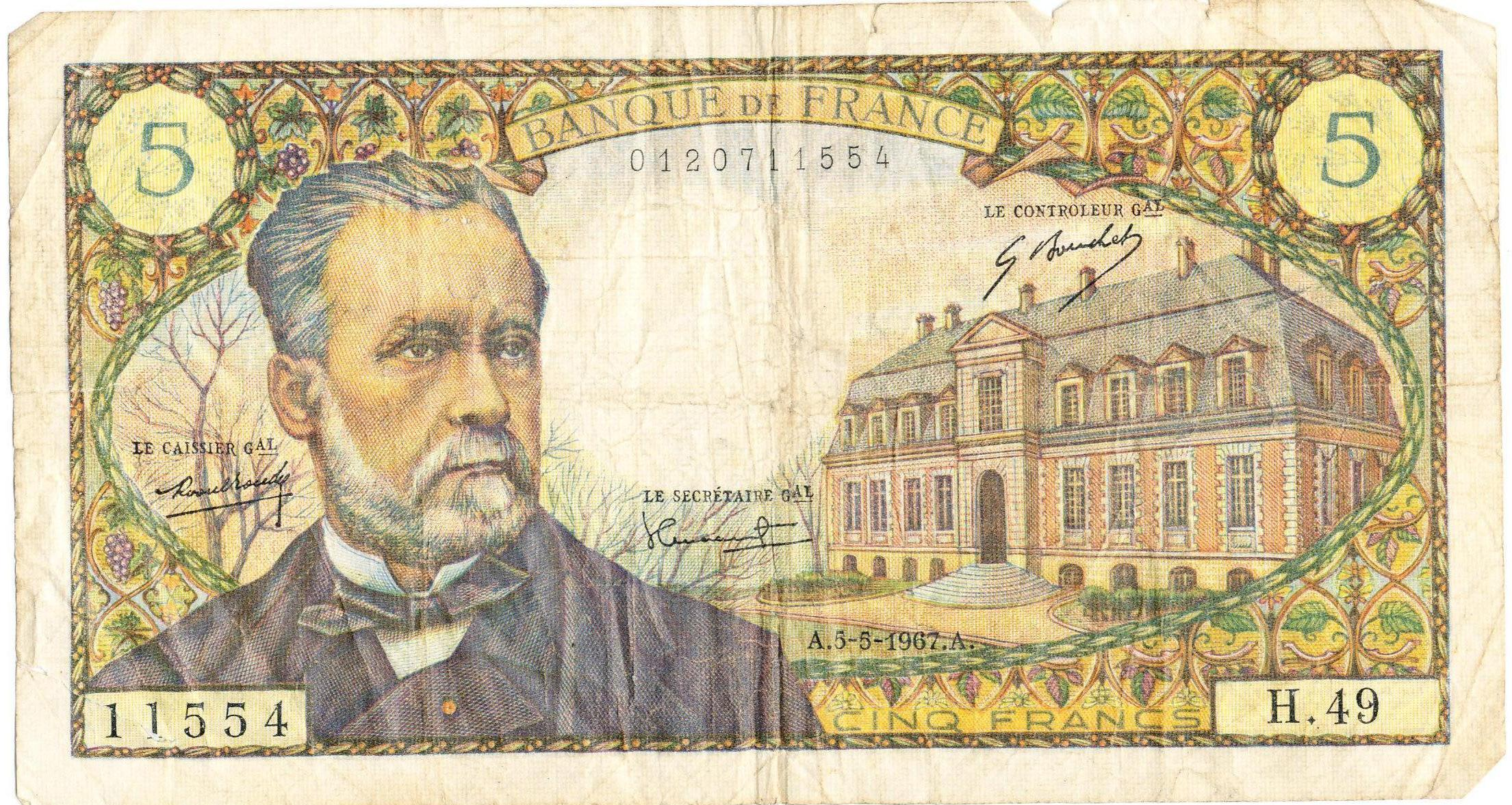 billet de cinq francs français 1967